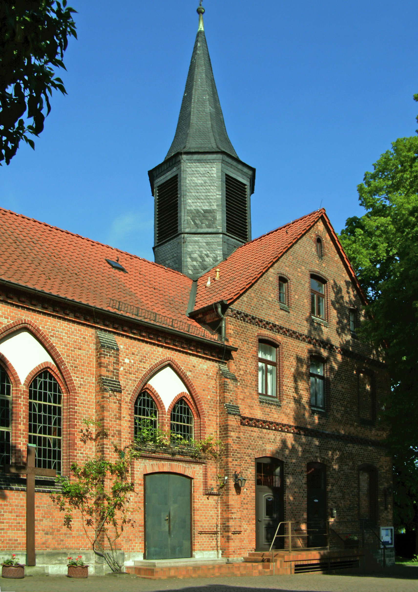 Katholische Kirche Herz Jesu in Eilsleben, Landkreis Börde